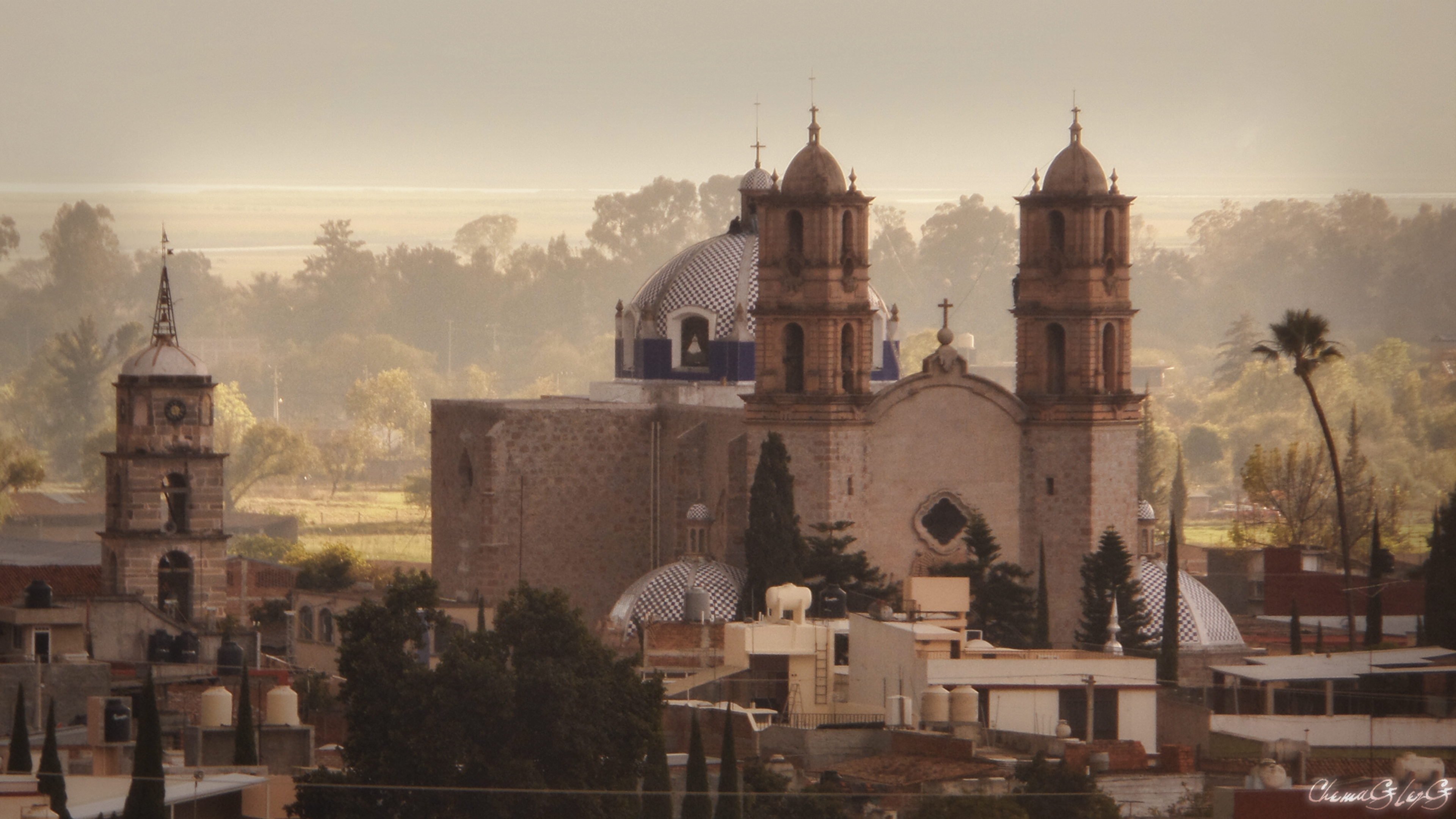 Parroquia de San Jerónimo a la Izquierda y Parroquia del Señor del Amparo a la Derecha